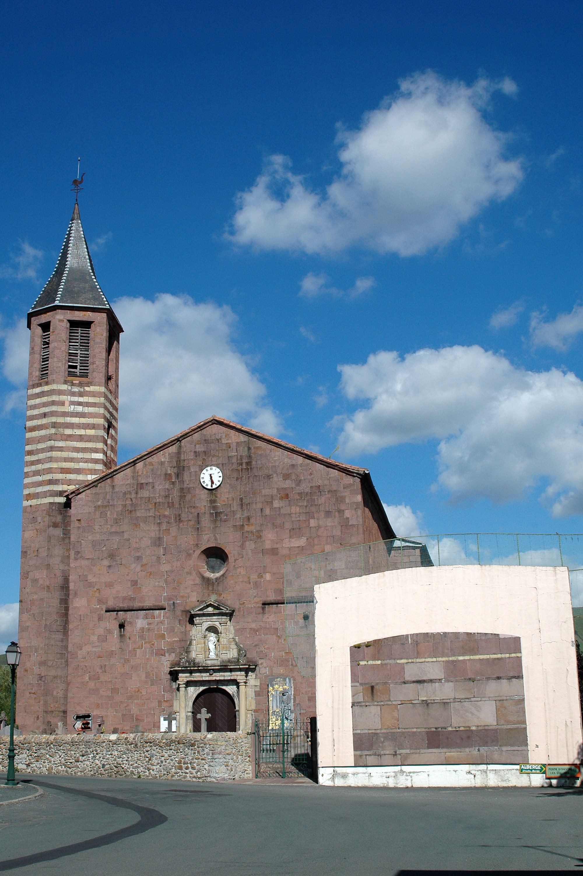 Ossès, le fronton adossé à l'église. Photo prise le 03/08/06 par Harrieta171